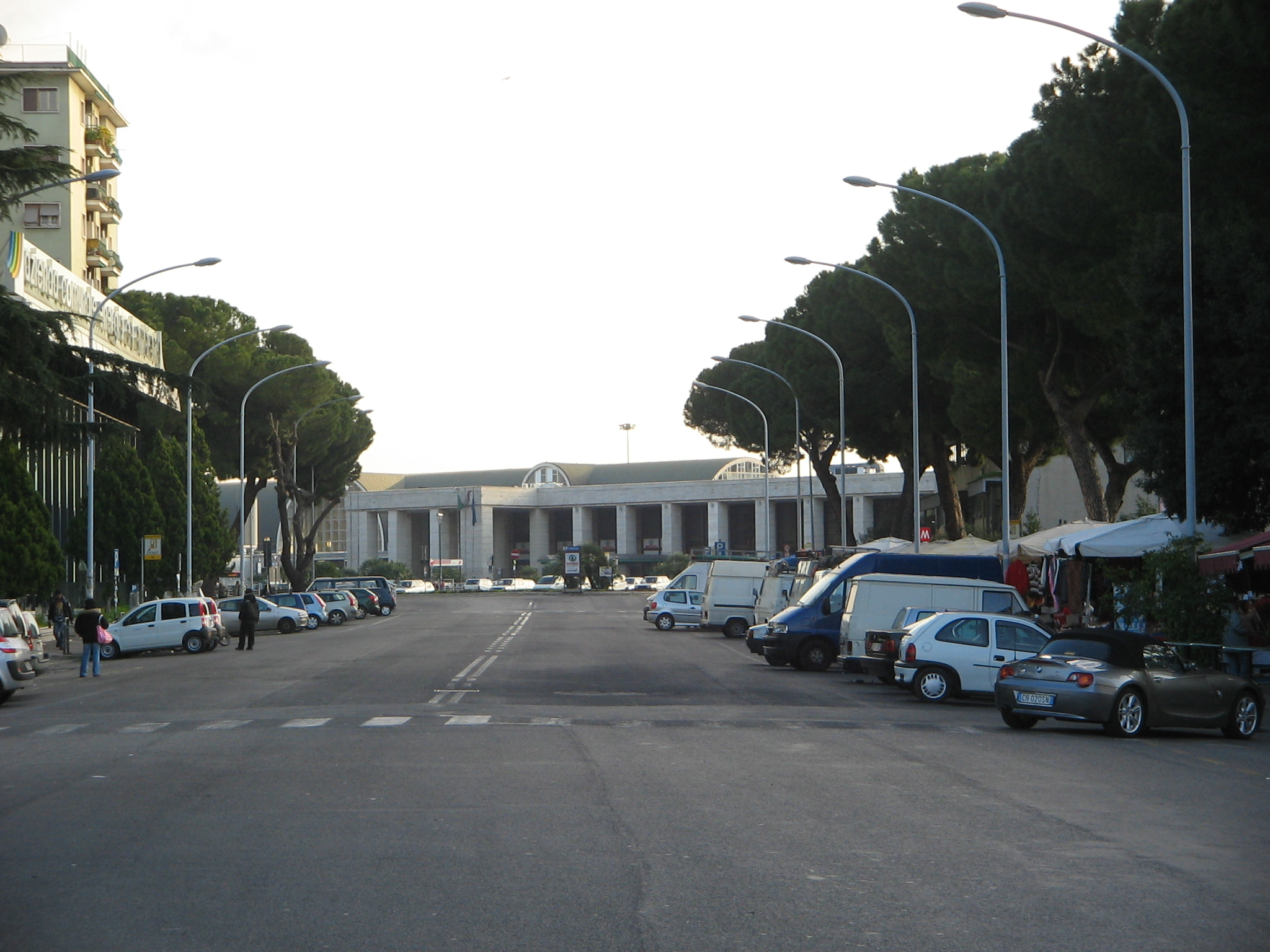 Roma: stazione Ostiense. A sinistra, il palazzo dell'ACEA